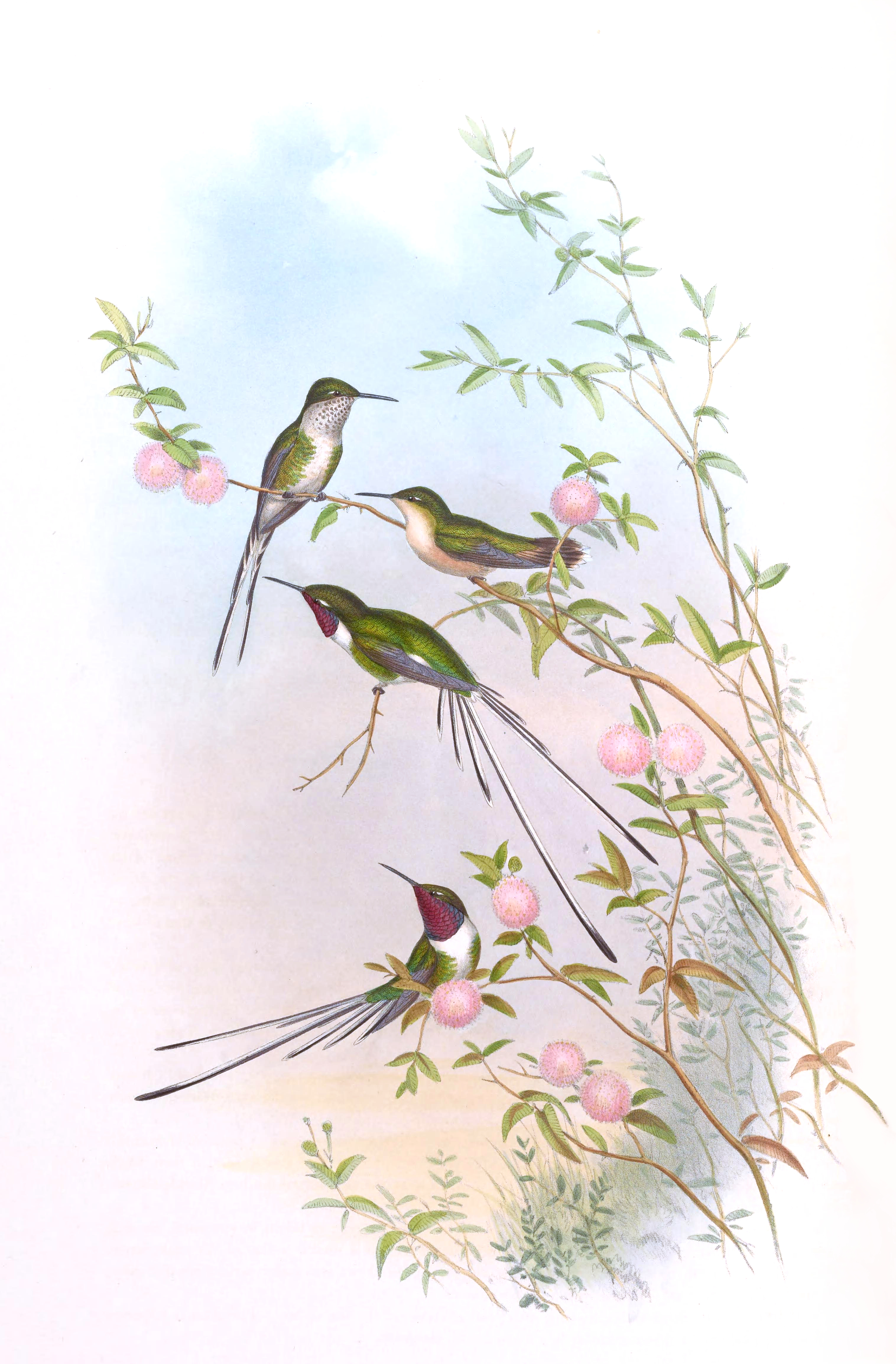 Thaumastura cora in John Gould's Hummingbirds ISBN 978-1555216610